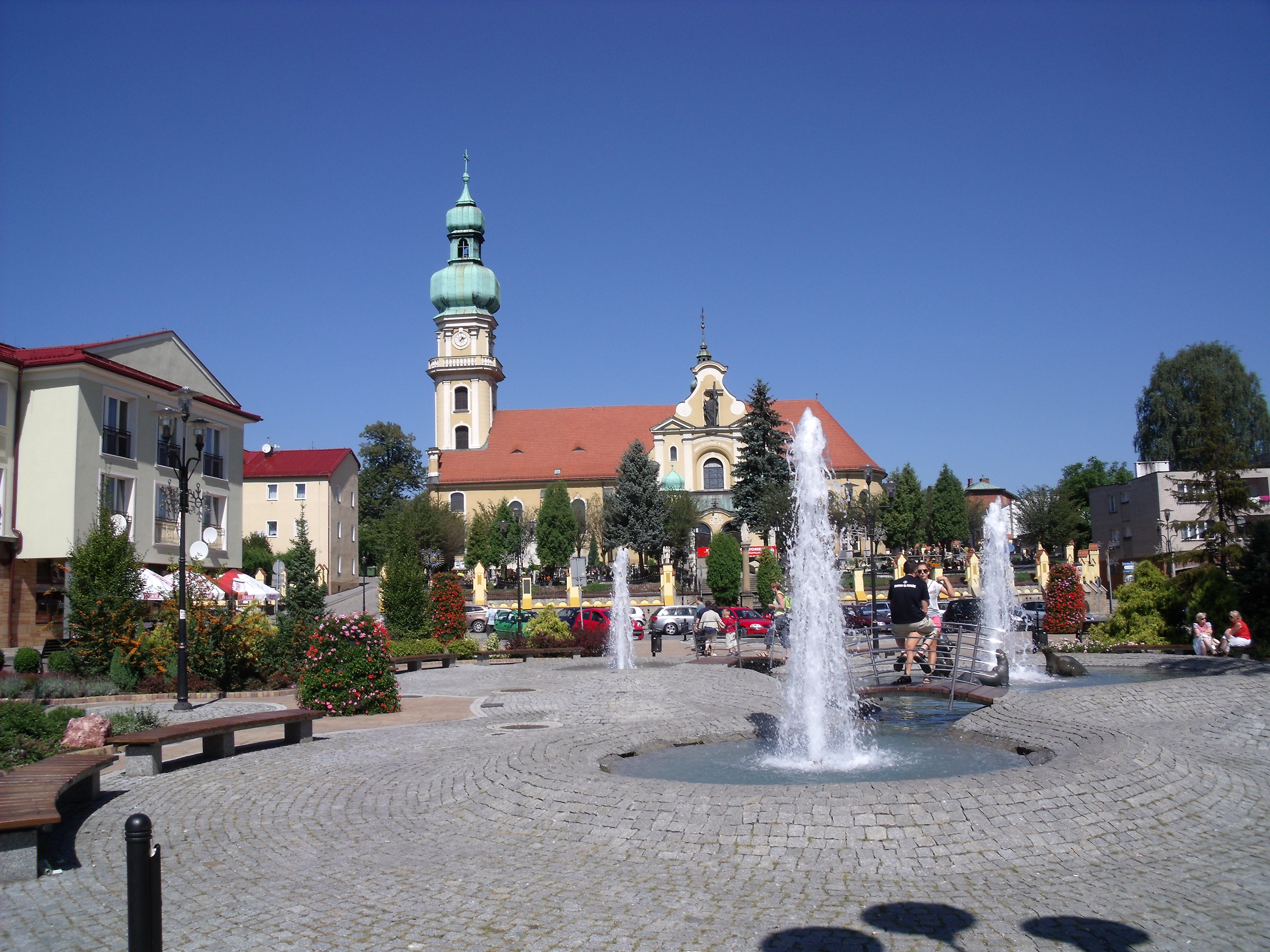 Rynek stan 2012 r.